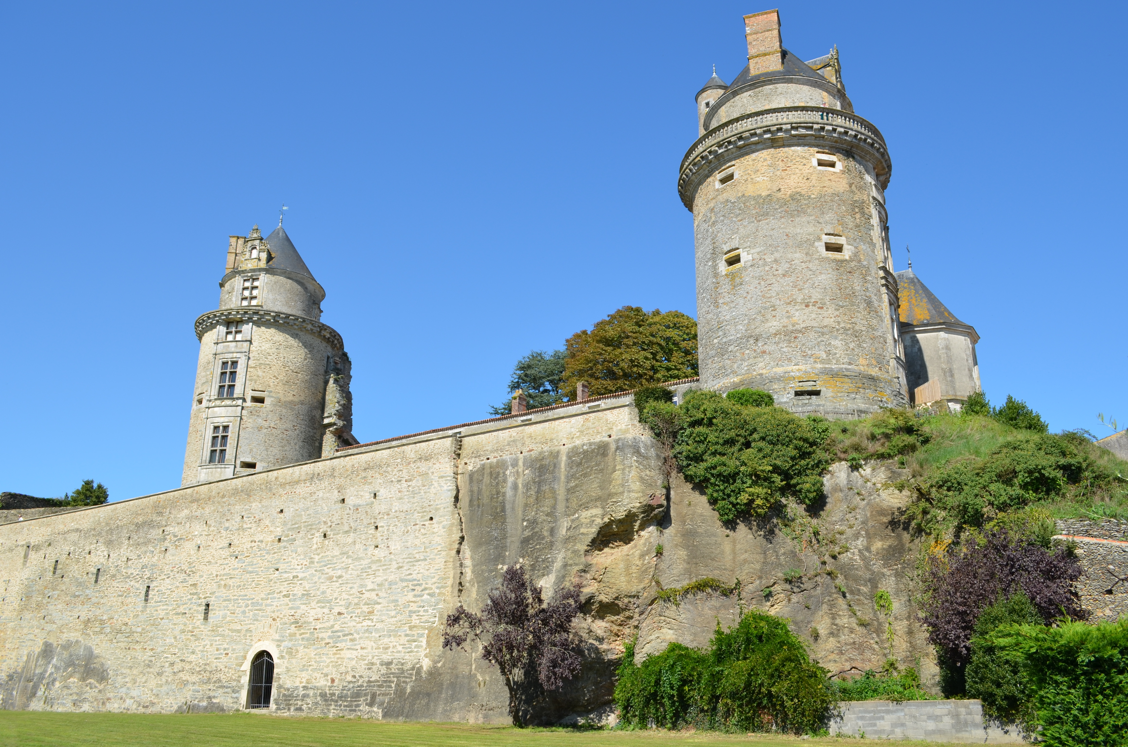 Château Renaissance construit au début du XVIè siècle - Apremont (Vendée) This building is en partie classé, en partie inscrit au titre des Monuments Historiques. .